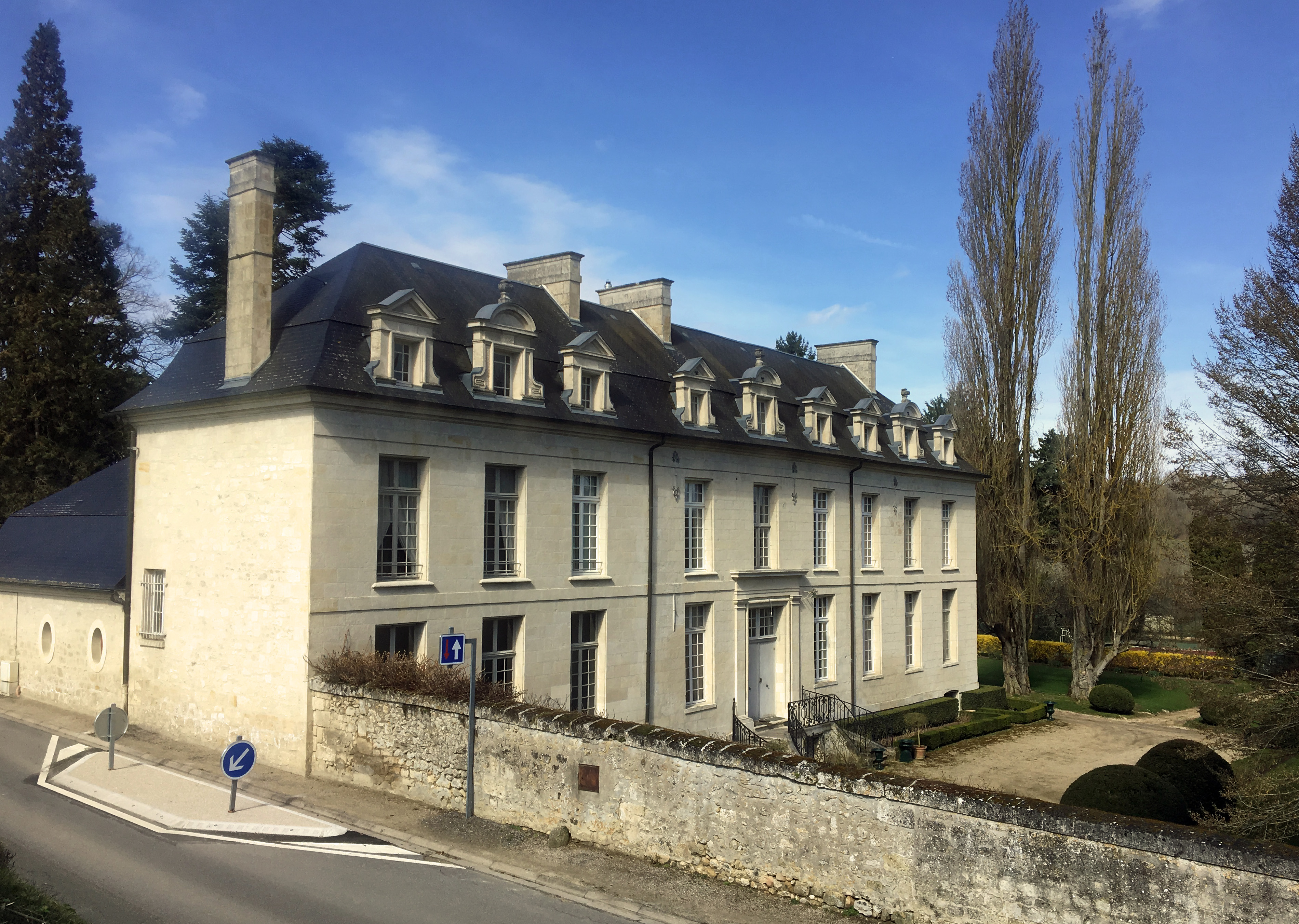 Château de Rozières